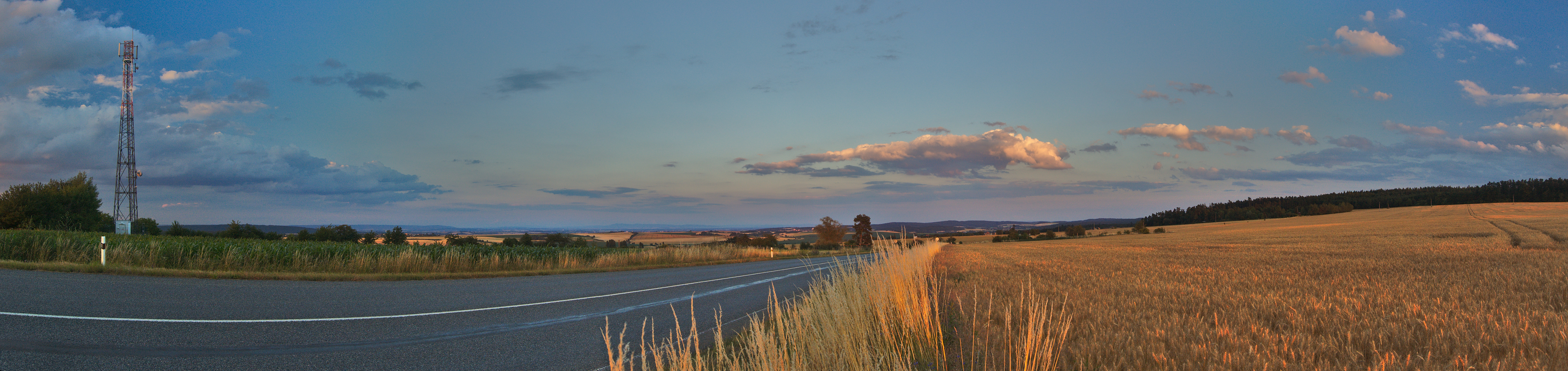 Panoramatický pohled na Vícov od silnice na Stínavu, okres Prostějov